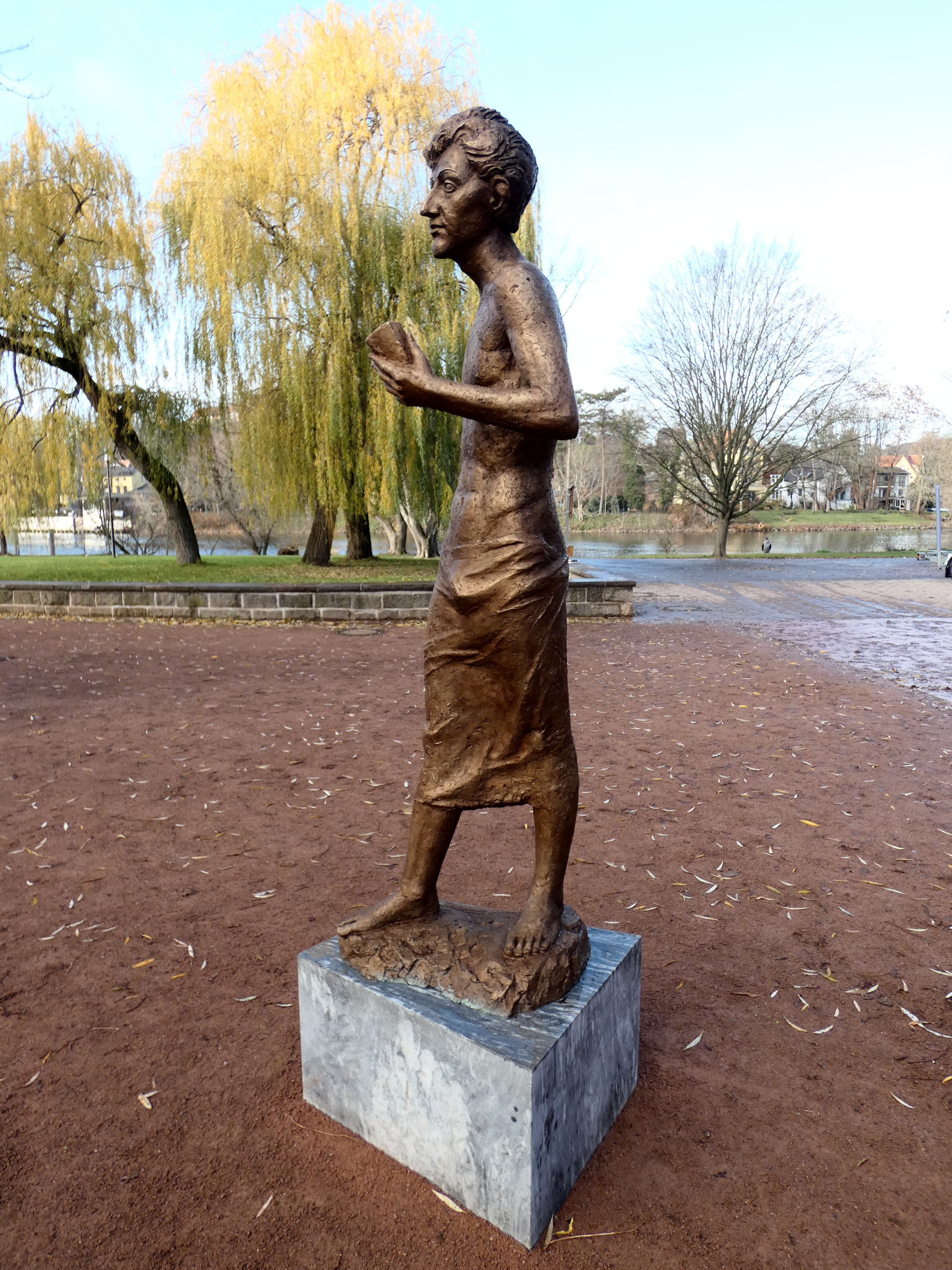 Eichendorff-Denkmal an der Saalepromenade, Halle (Saale), Bildhauer: Bernd Göbel, Bronze, 2019